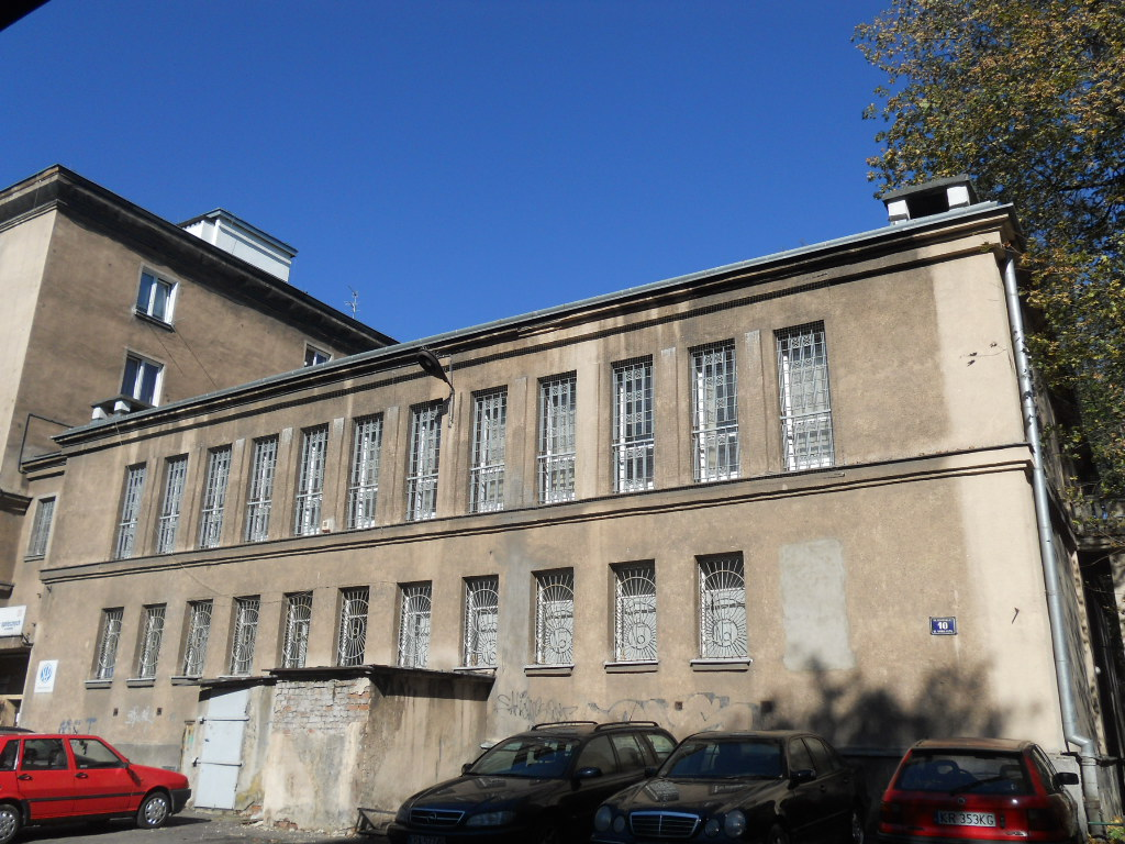 Budynek Naczelnej Organizacji Technicznej (NOT-u) na Osiedlu Centrum C 10 w Krakowie-Nowej Hucie.